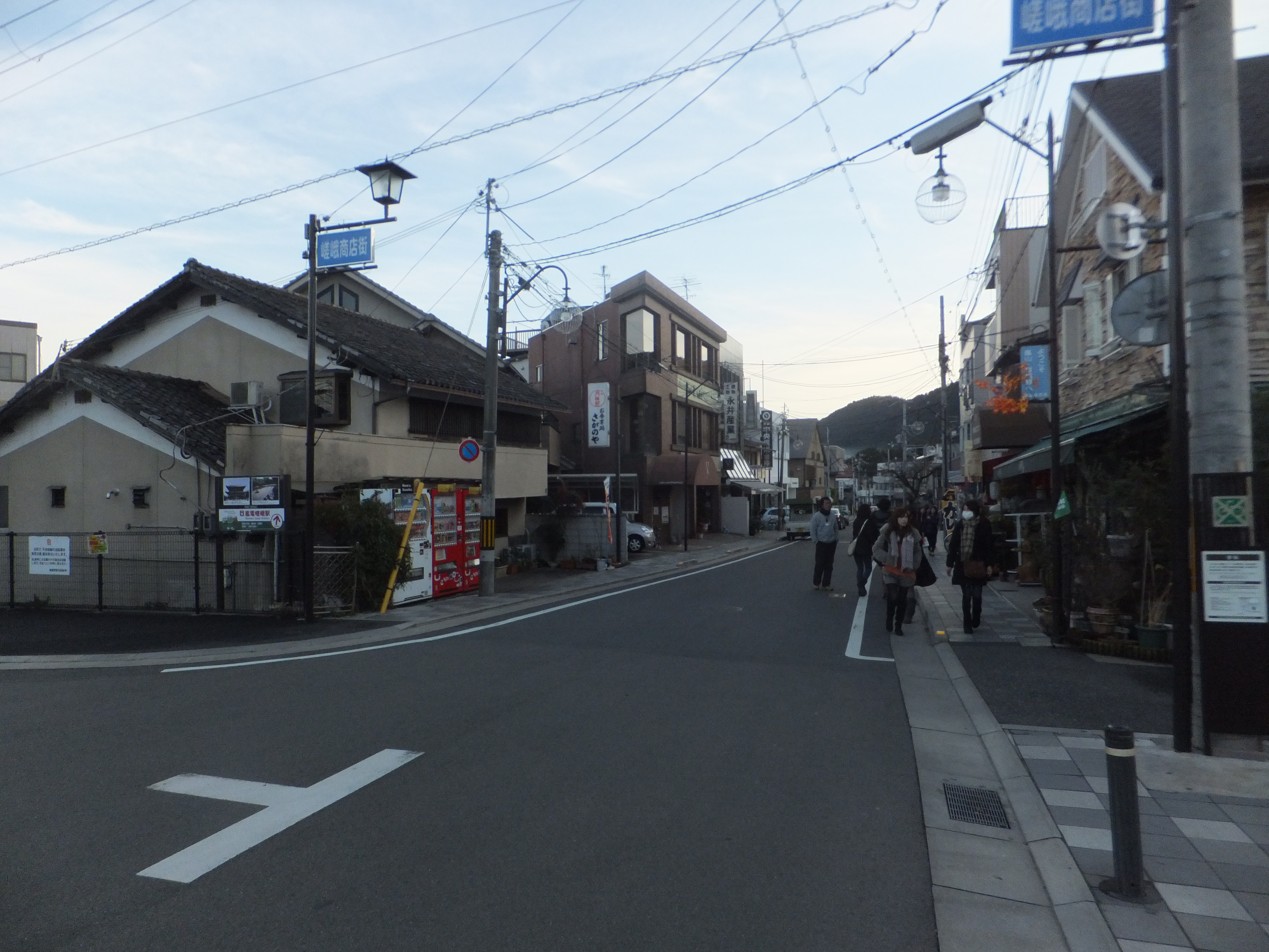 京都府京都市右京区嵯峨天龍寺車道町 京都府道135号嵯峨嵐山停車場線